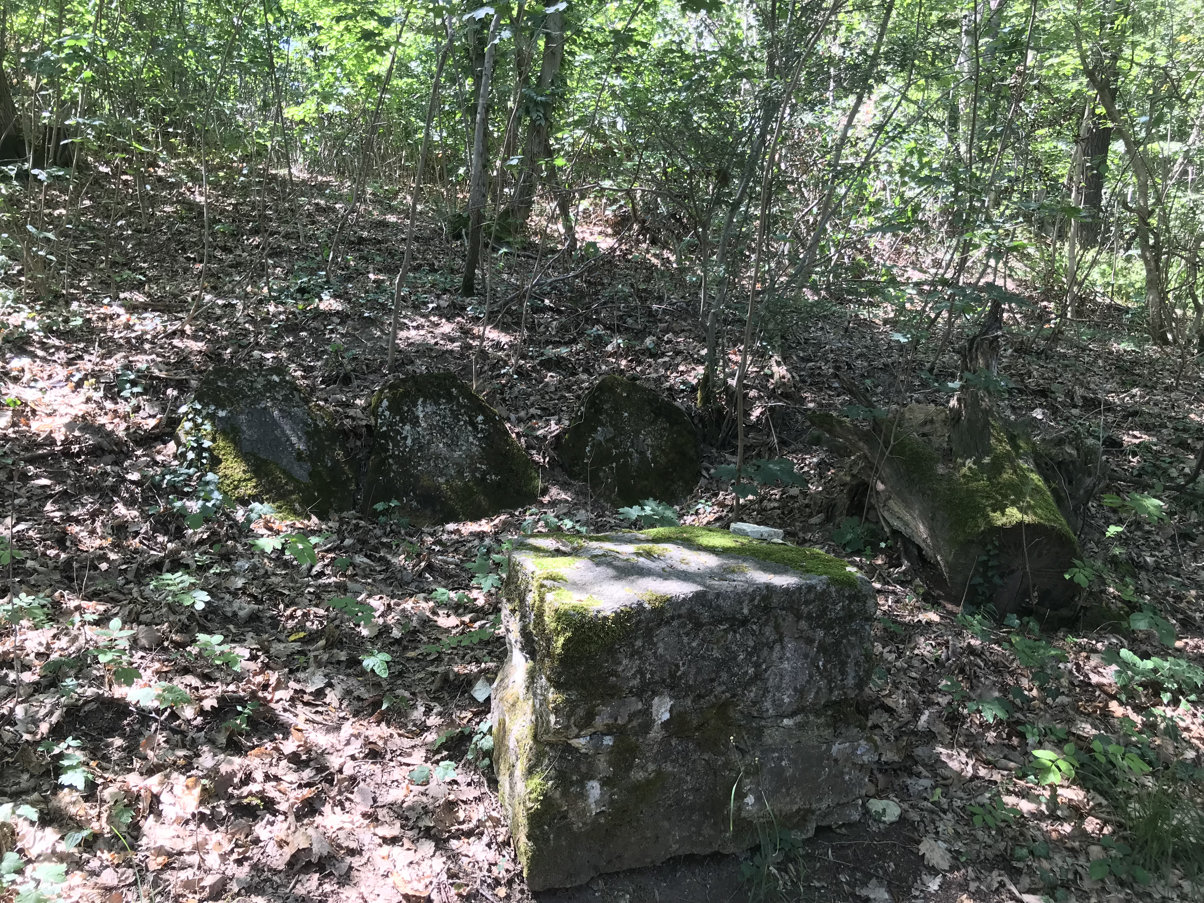 Friedenssteine in der Fränkenauer Hohle, Bad Kösen